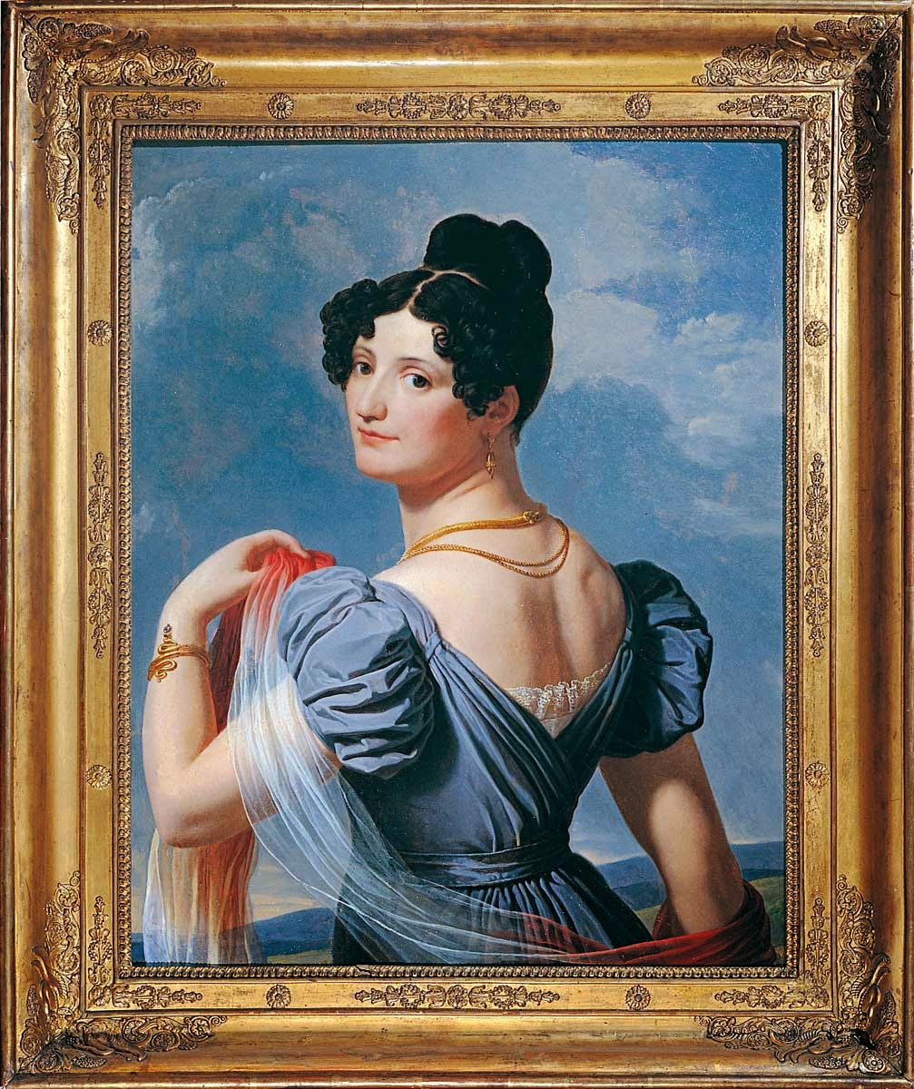 Charles Thévenin (1764–1838): Anne-Françoise-Hippolyte Boutet genannt Mademoiselle Mars (1779–1847), Schauspielerin an der Comédie-Française, in malvenfarbenem Seidenkleid, 1821